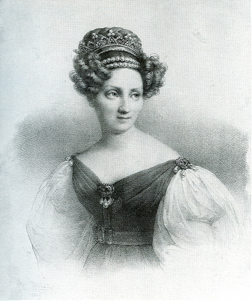 Stéphanie de Beauharnais with Diadem; House of Baden